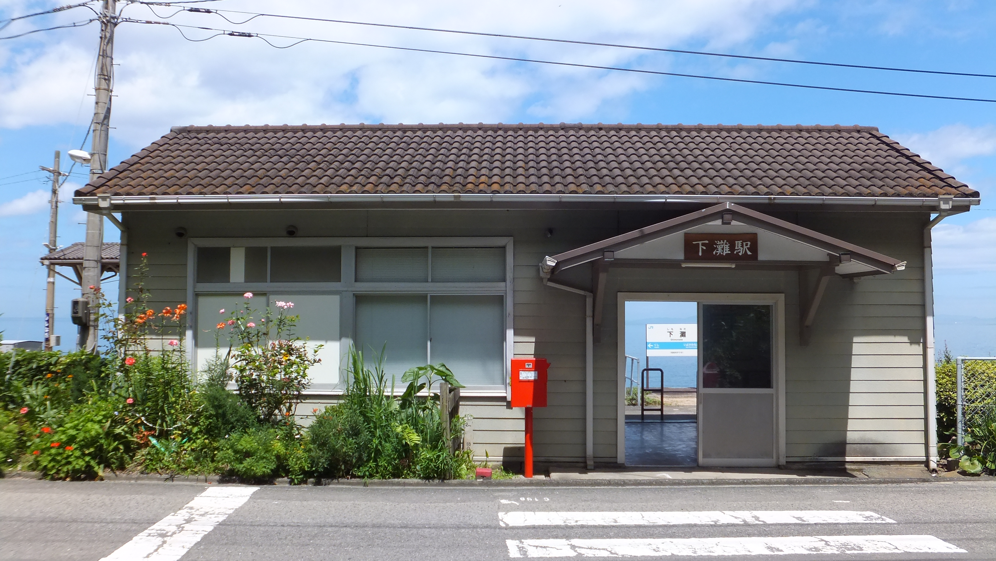 愛媛県伊予市双海町 下灘駅 駅舎